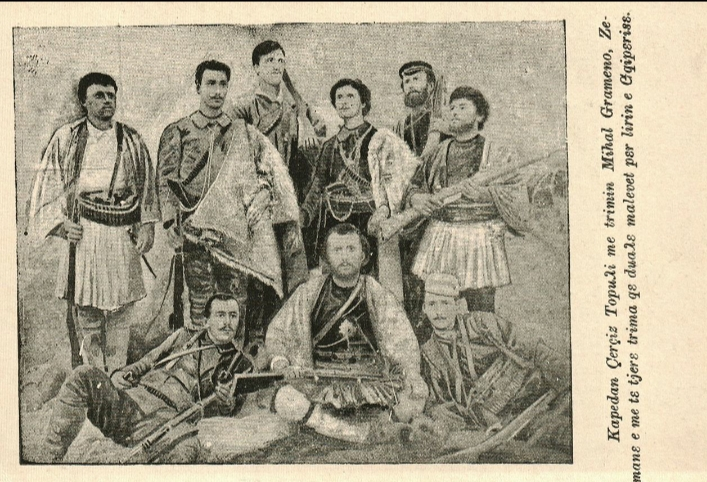 Çete lideri Çerçiz Topulli ve Mihael Grameno